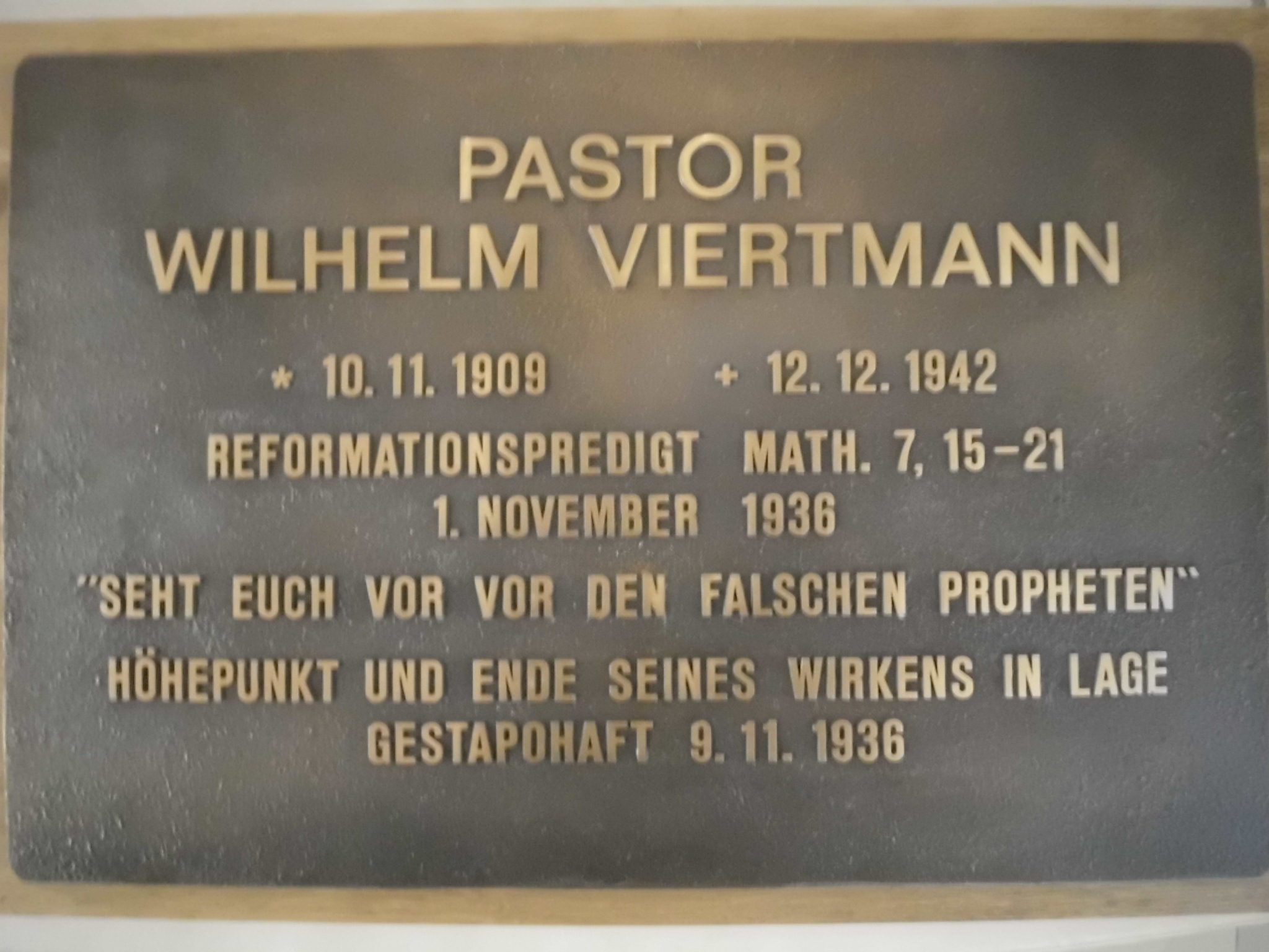 Gedenktafel für den Prediger Wilhelm Viertmann in der Heilig-Geist-Kirche zu Lage / Lippe